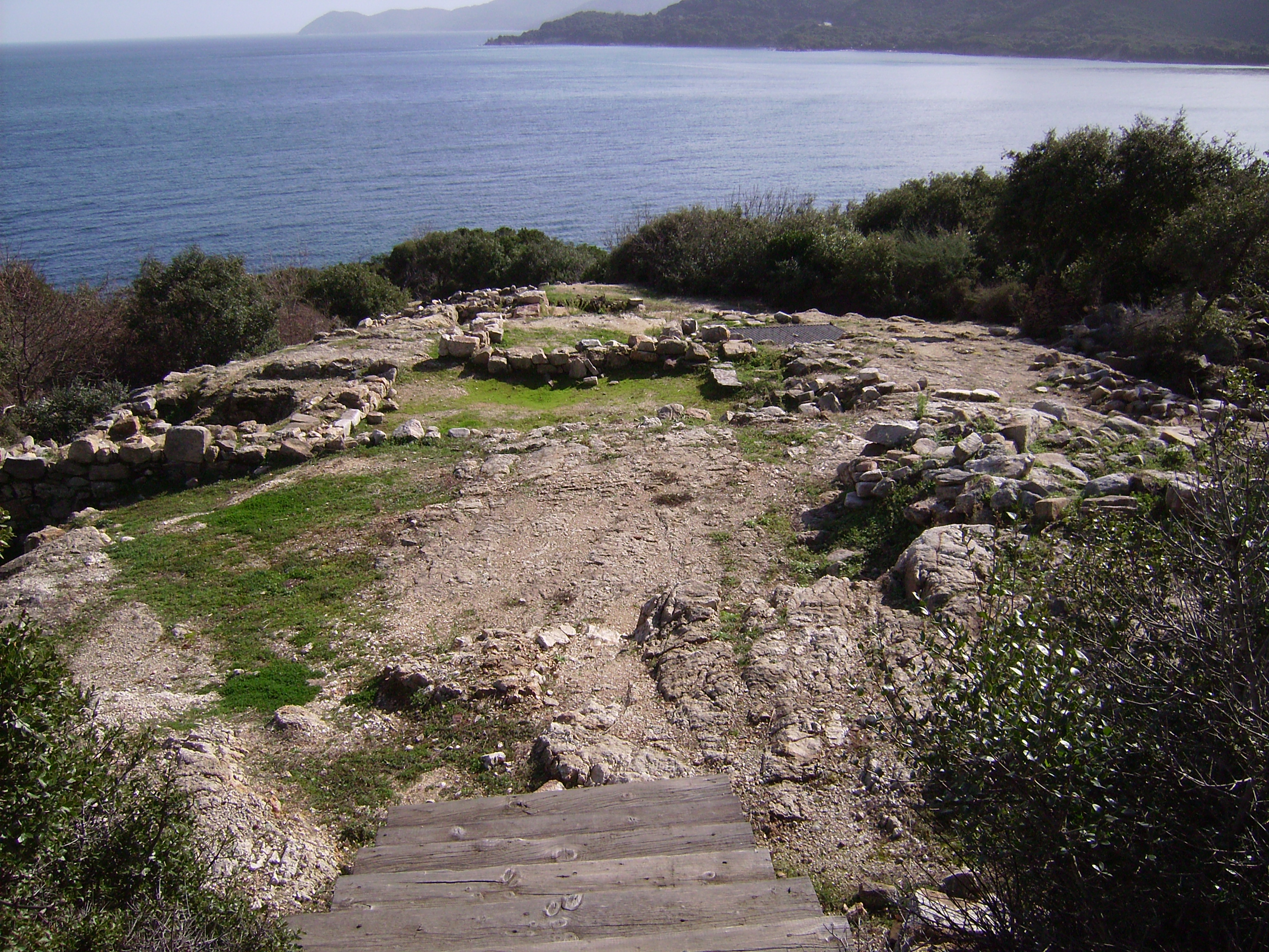 «Τορώνη»